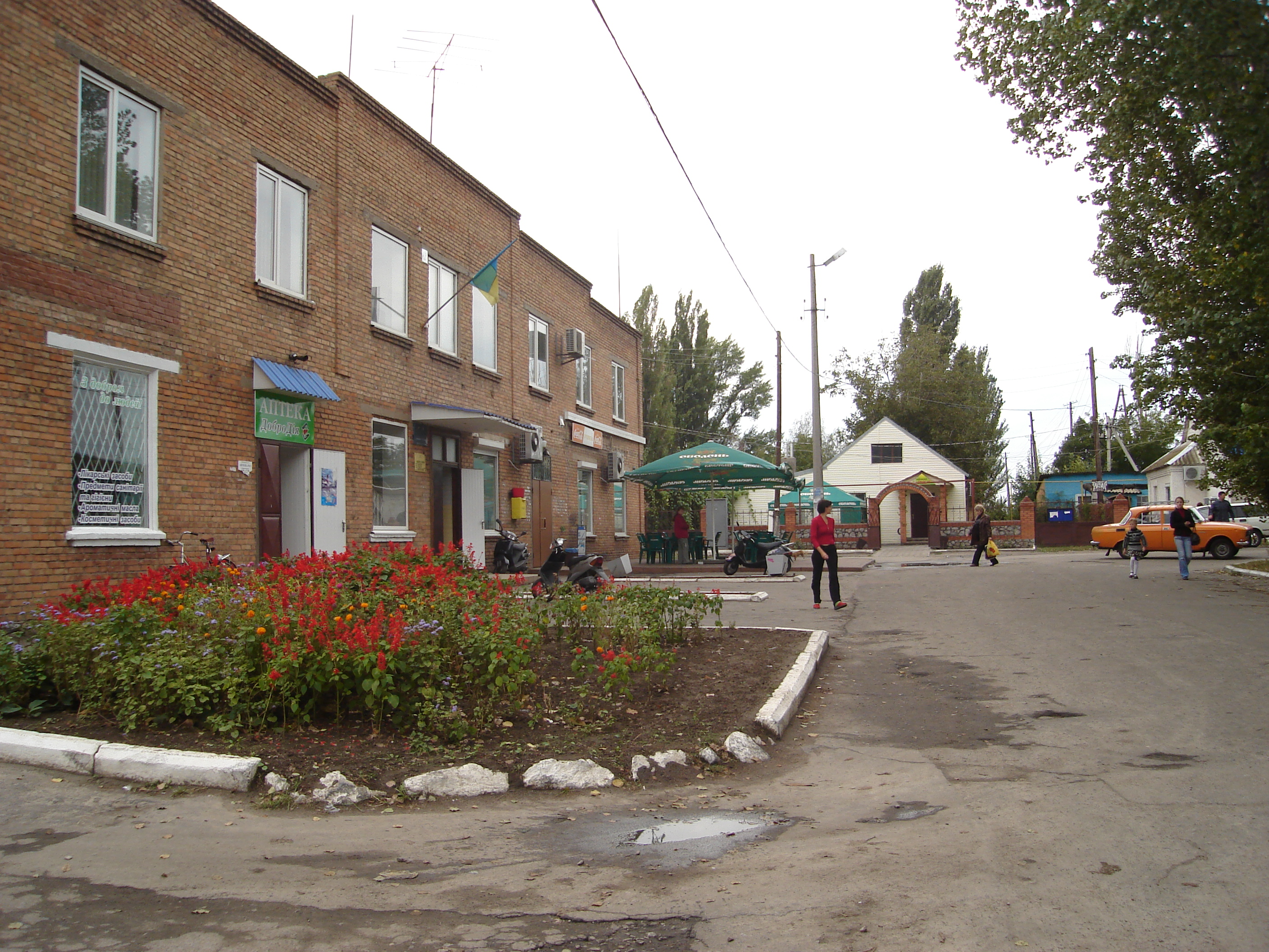 Административный центр